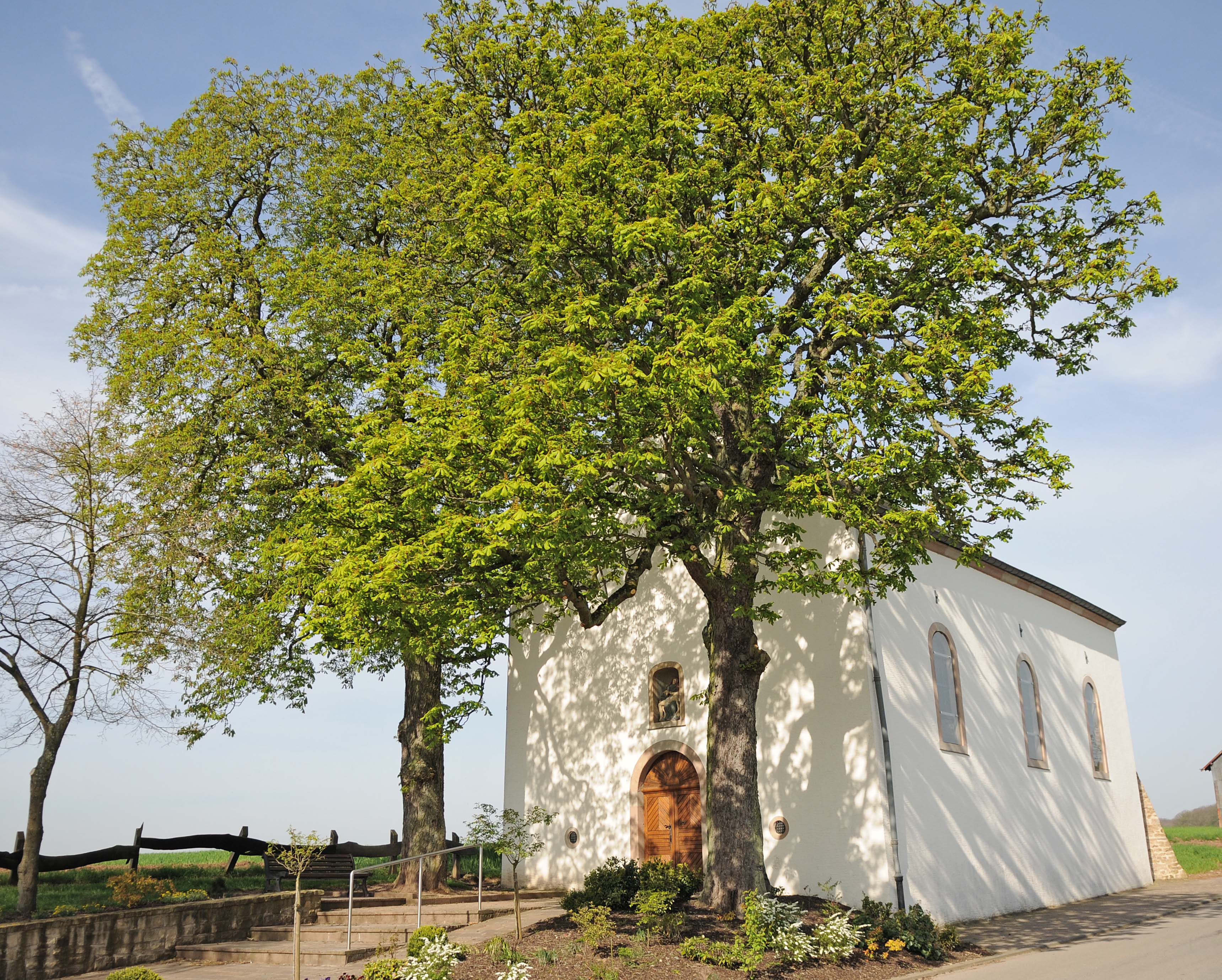 Biissen Kapell um Wobierg.